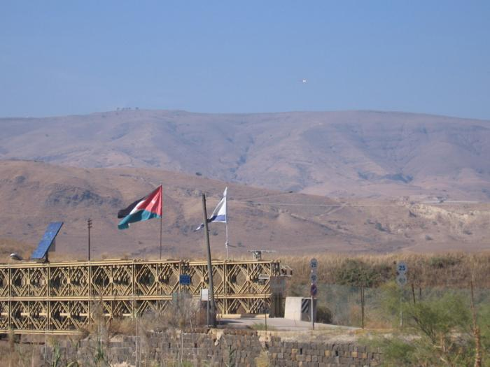 מעבר הגבול הישראלי / ירדני אל "אי-השלום".